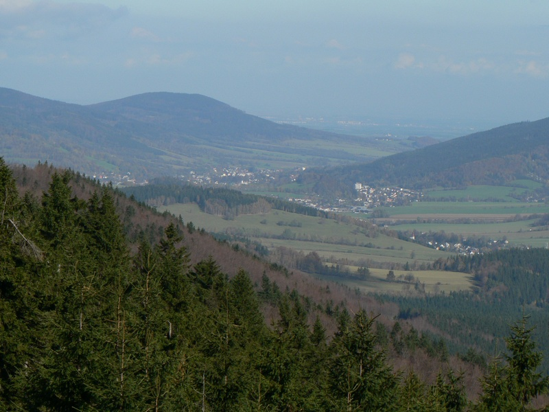 Pohled na kotlinu Jeseníku z Červenohorského sedla.